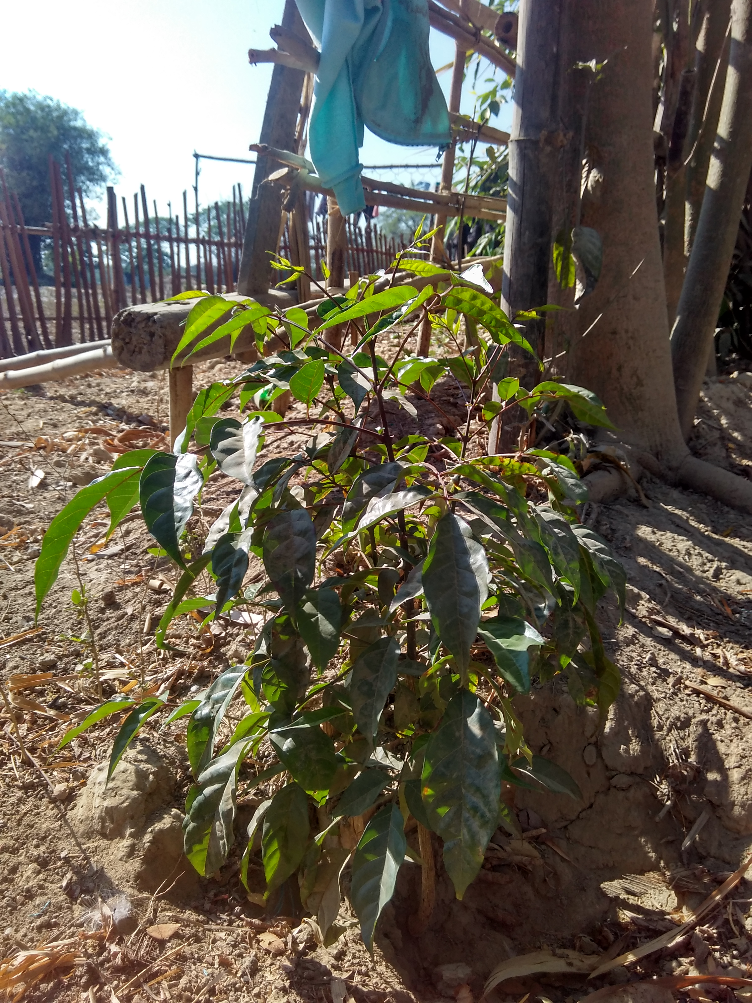 မြန်မာဘာသာ: သခွတ်ပင် အပင်ငယ်ပုံ